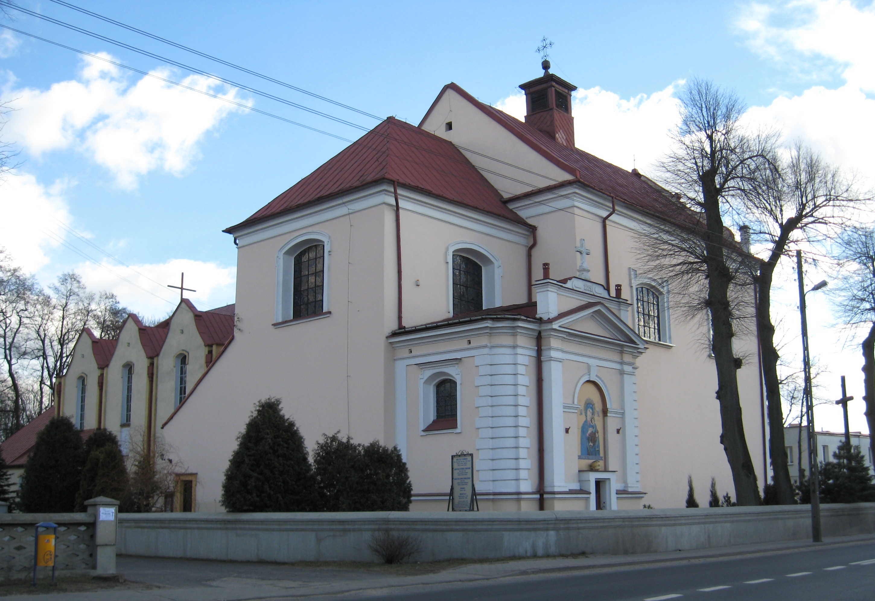 Kirche in Ujazd, Powiat Tomaszowski.